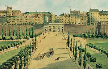 Das Schottentor wurde in klassizistischer Manier - ähnlich dem Neuen Burgtor - im Jahre 1840 erbaut. Seine Gliederung in zwei Geh- und drei relativ schmale Fahrtore erhielt vom Volksmund die Bezeichnung "die fünf Torheiten".